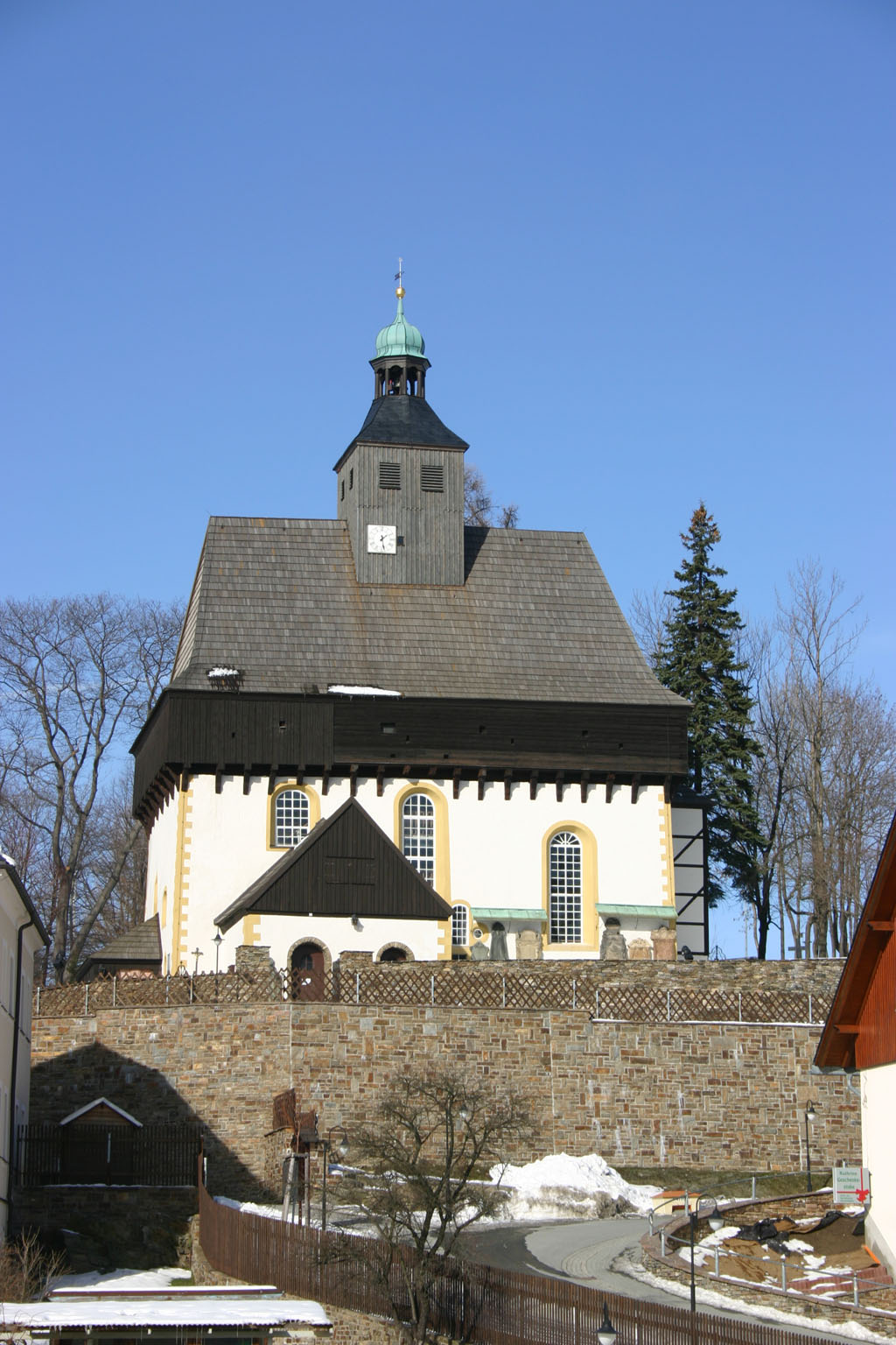 Wehrkirche grossrueckerswalde